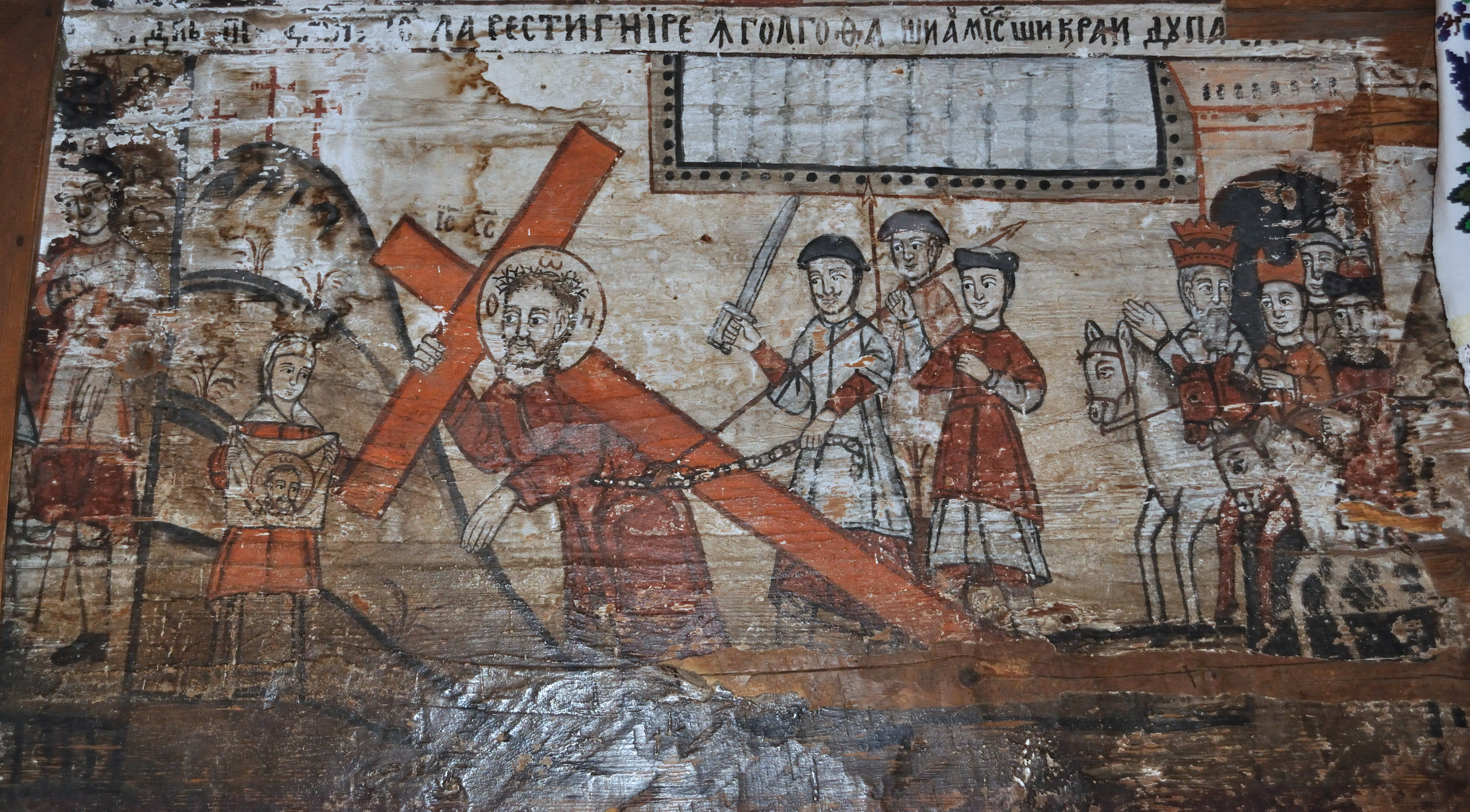 Biserica de lemn din Budești Susani, comuna Budești, județul Maramureș